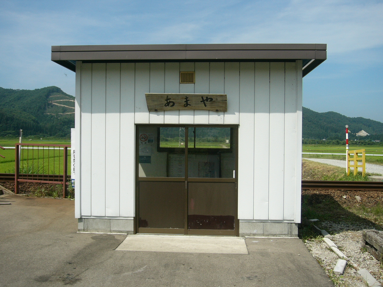 Amaya Station